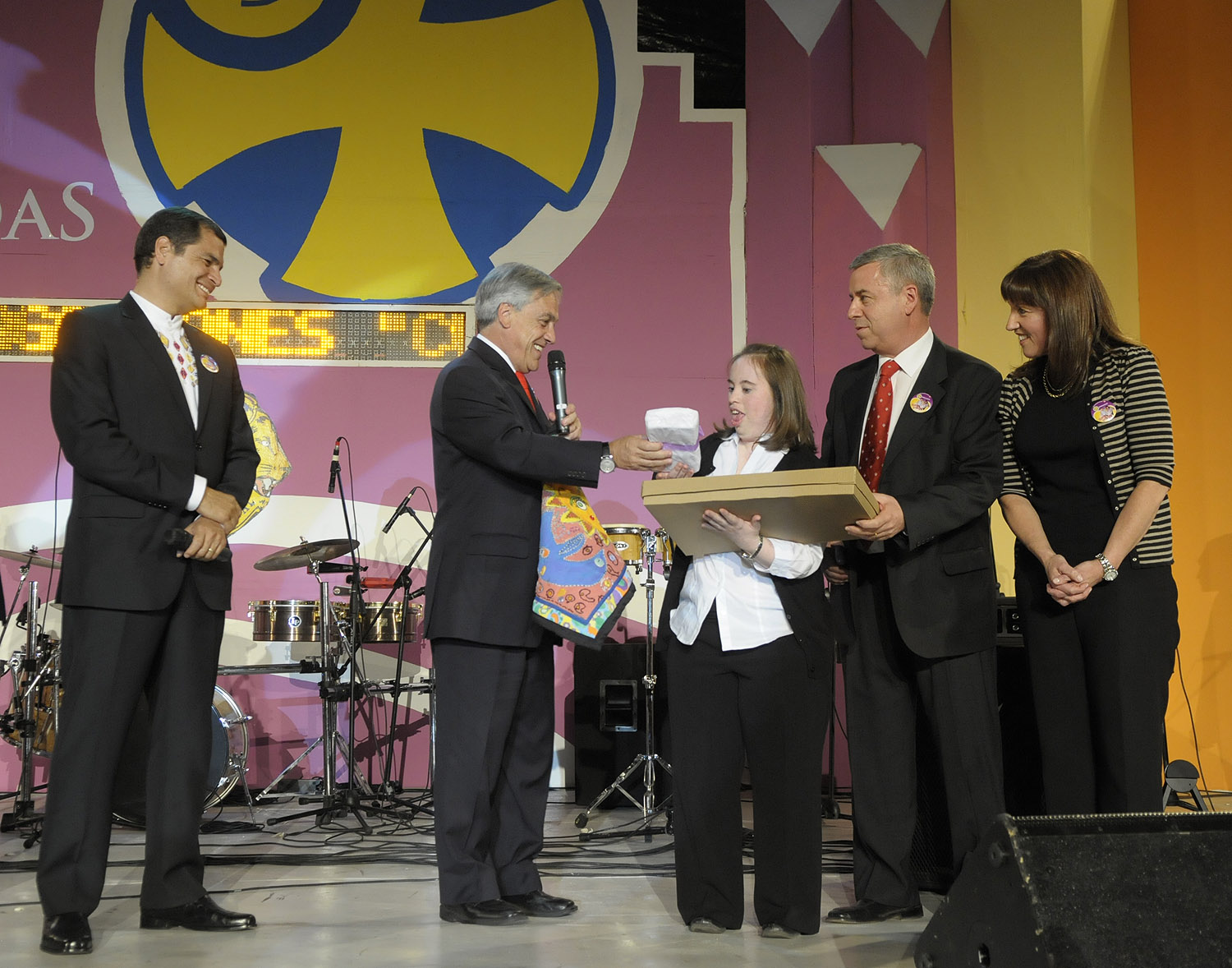 Sebastián Piñera en la Inauguración del Niño impedido Magallánico 2010.